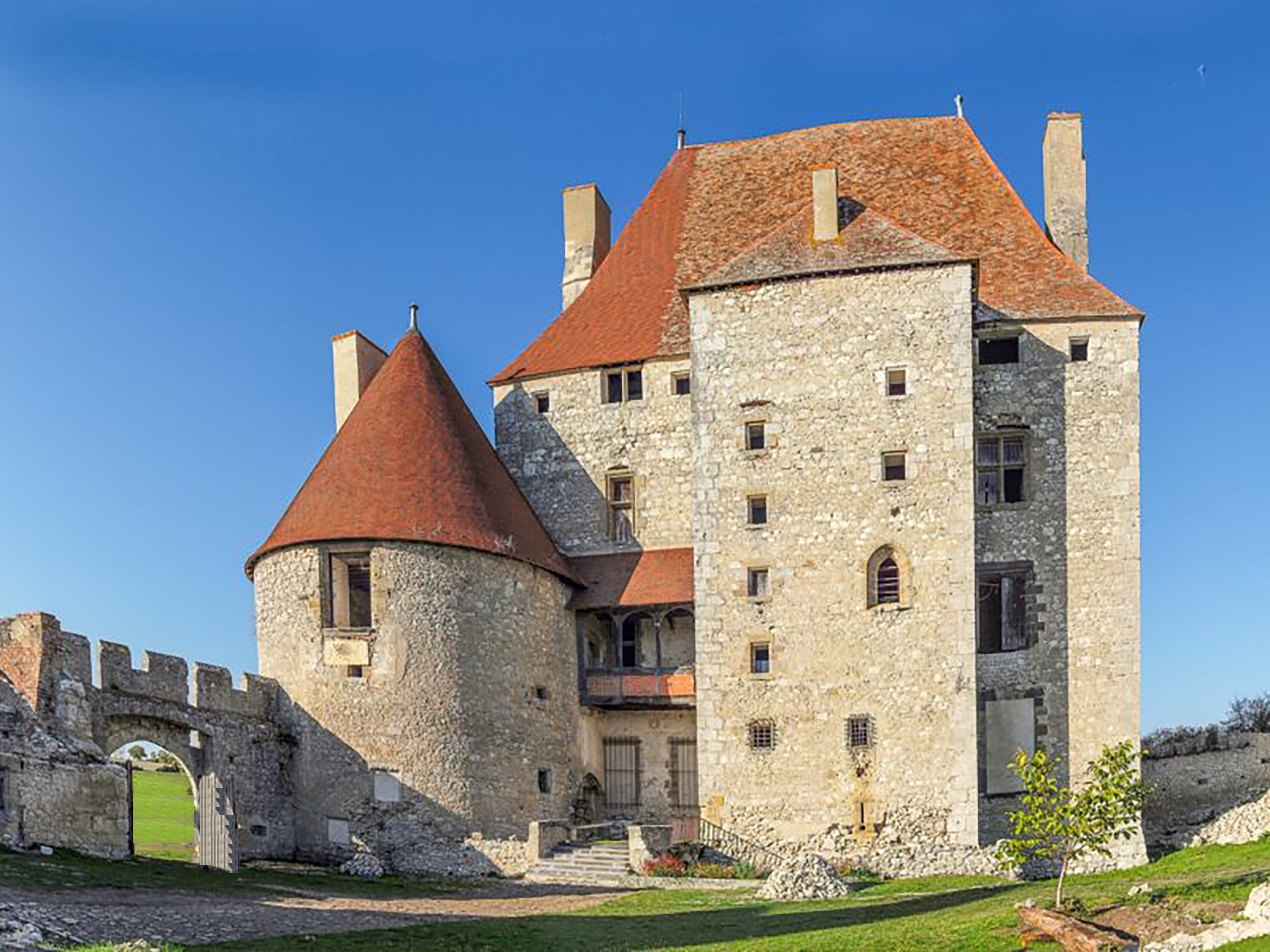 Donjon (JSA)